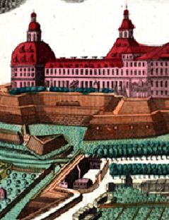 Gebäudegruppe der Münze im Wallgraben um 1740, Ausschnitt aus "Die Hochfürstliche Residentz Frieden und Haupt Stadt Gotha". H. A. König delineavit. Augsburg: Seutter o. J. (kolorierter Kupferstich)